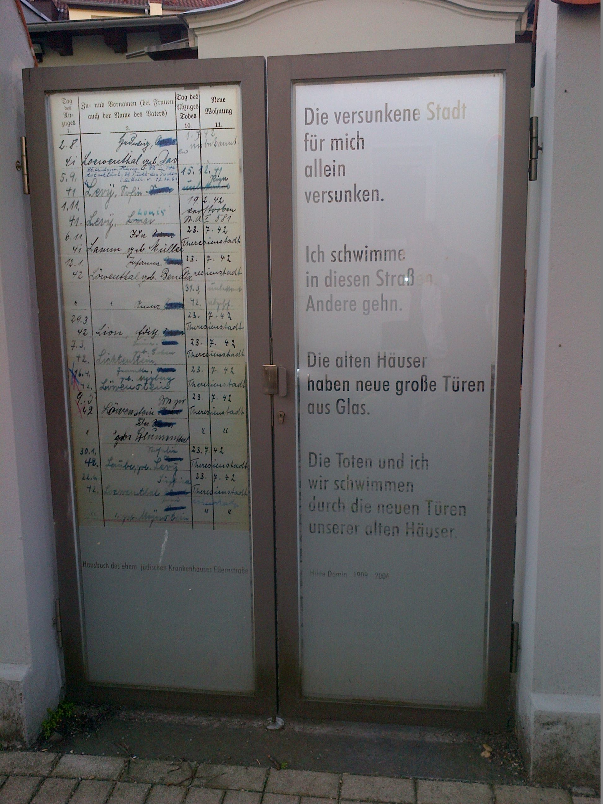 Ehemaliges jüdisches Krankenhaus Hannover - Glastür am Eingang zum ehemaligen Totenhaus.